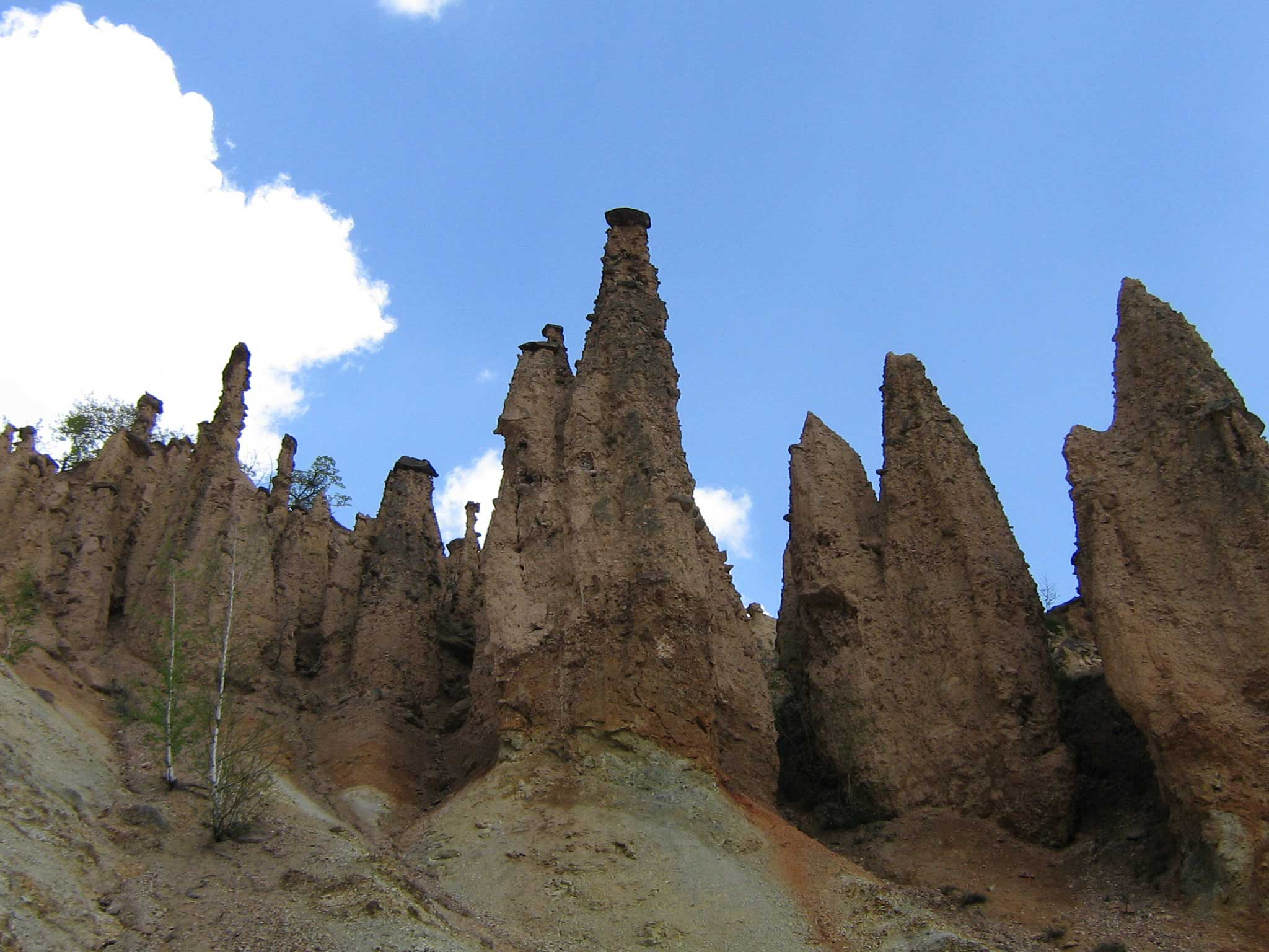 Devil's Town, near Kuršumlija, Serbia/La ville du diable, près de Kuršumlija, Serbie